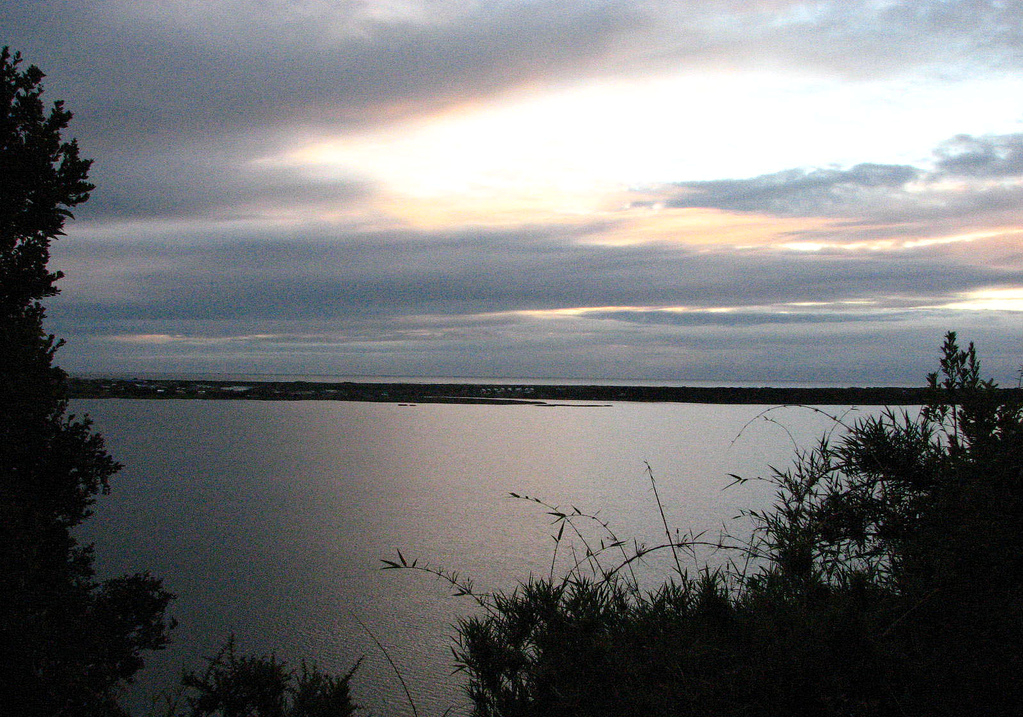 Lago Cucao, oeste de la Isla Grande de Chiloé, Chile.